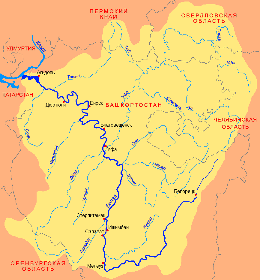 Схема бассейна Белой реки (притока Камы).